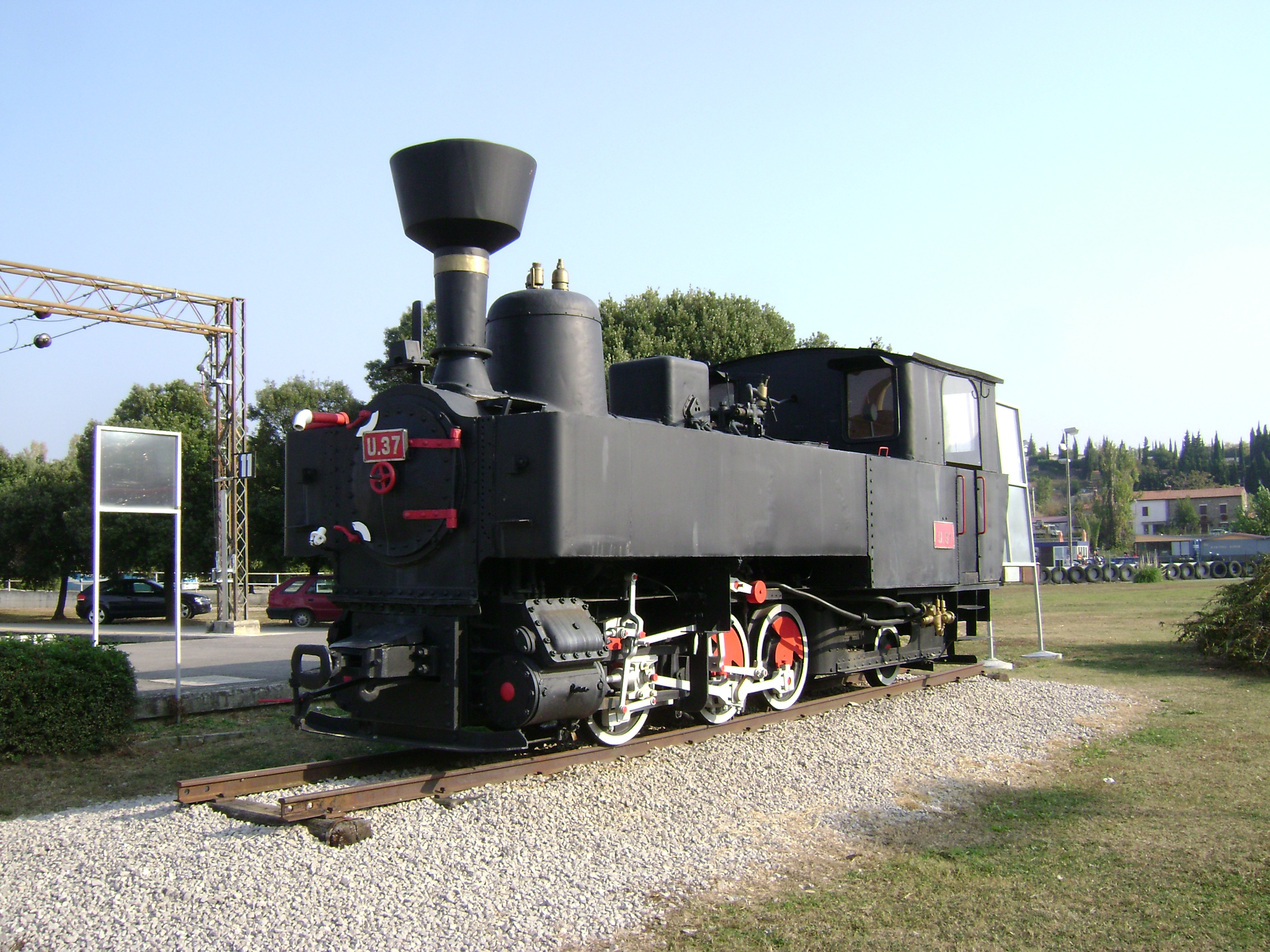 Parna lokomotiva serije 37 u Kopru Spomenik Parenzani